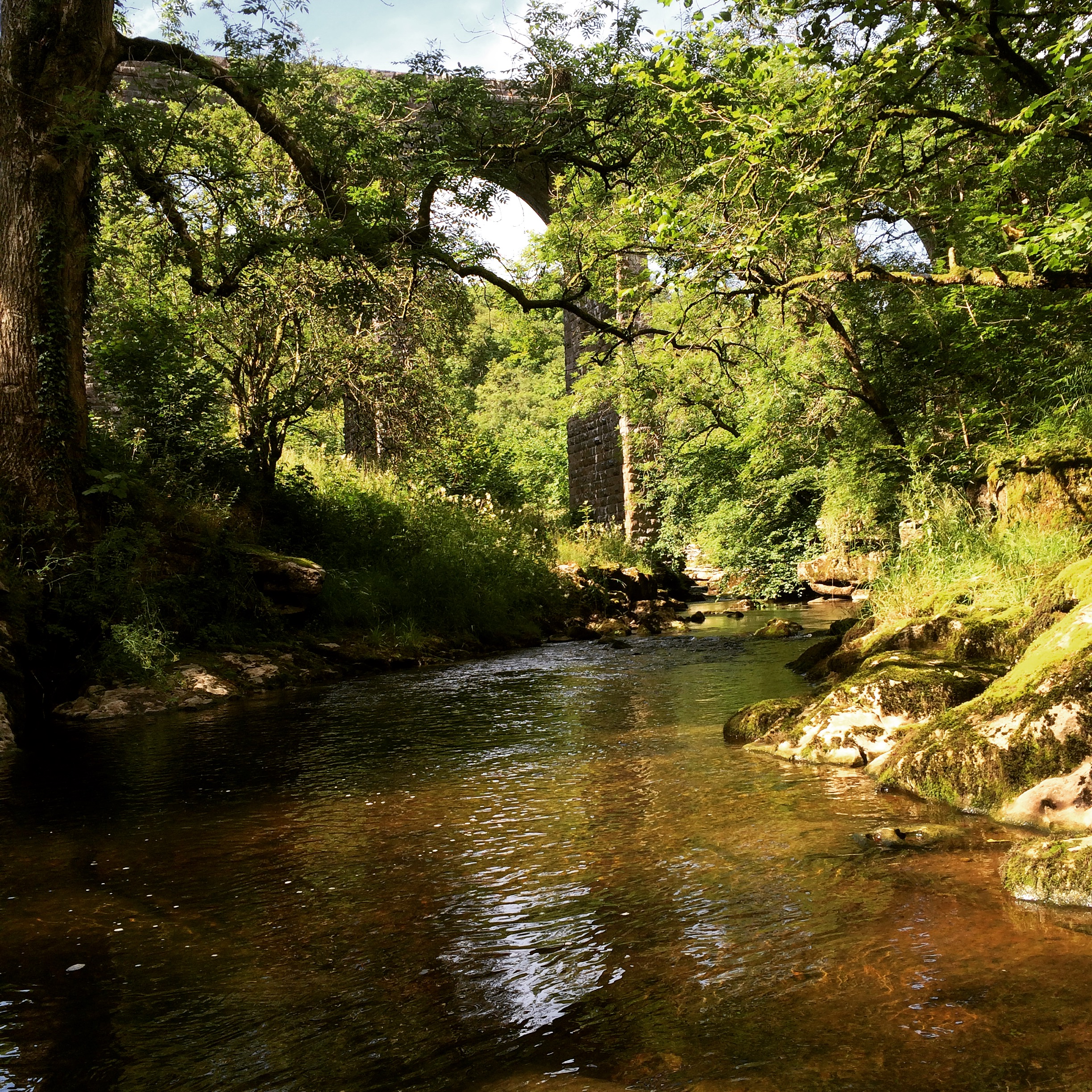 Taf Fechan a Thraphont Pont Sarn.